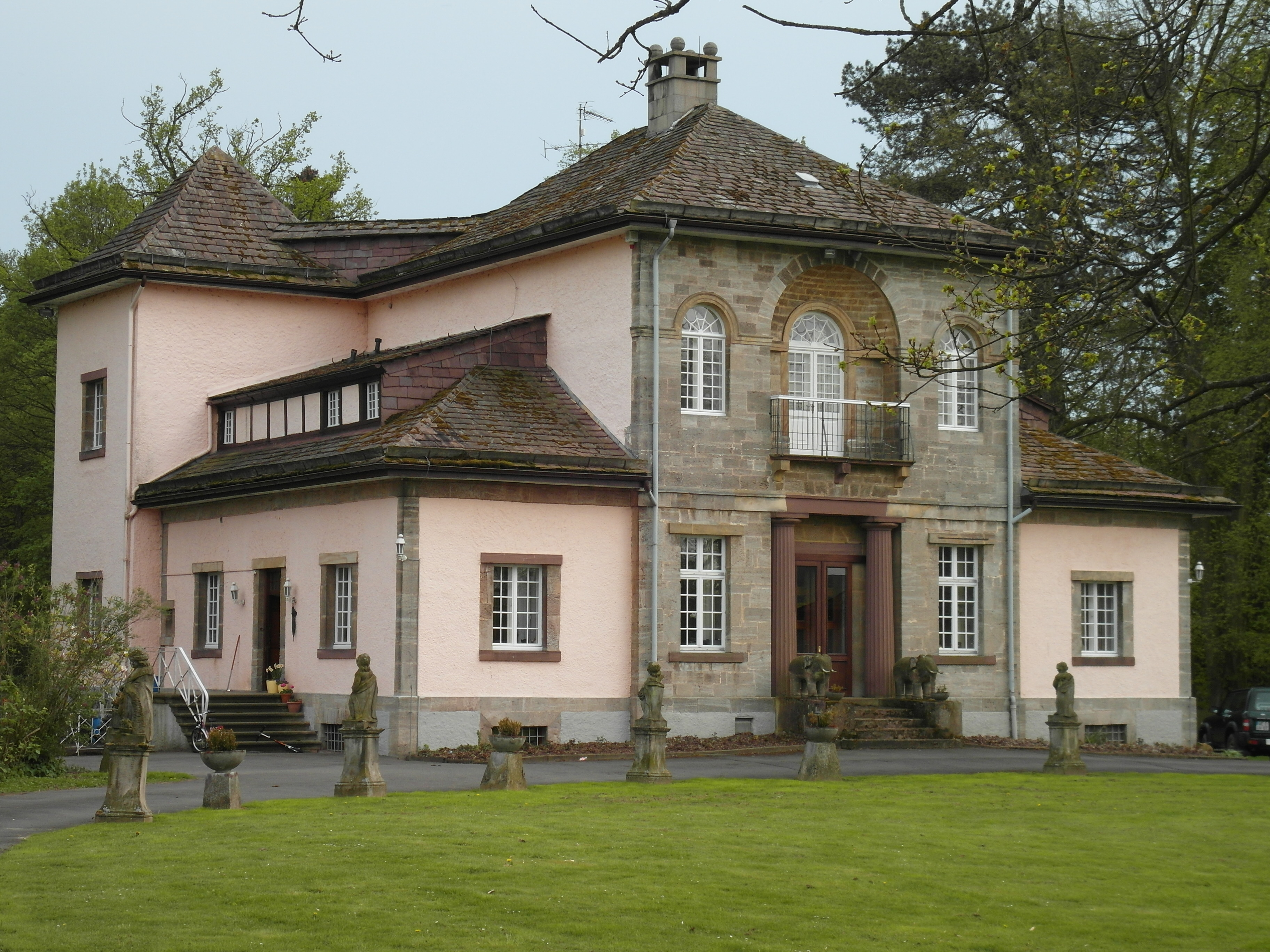 Dieses Foto zeigt das Schloss des Gutsparks Hainhausen in Brakel. This is a photograph of an architectural monument.